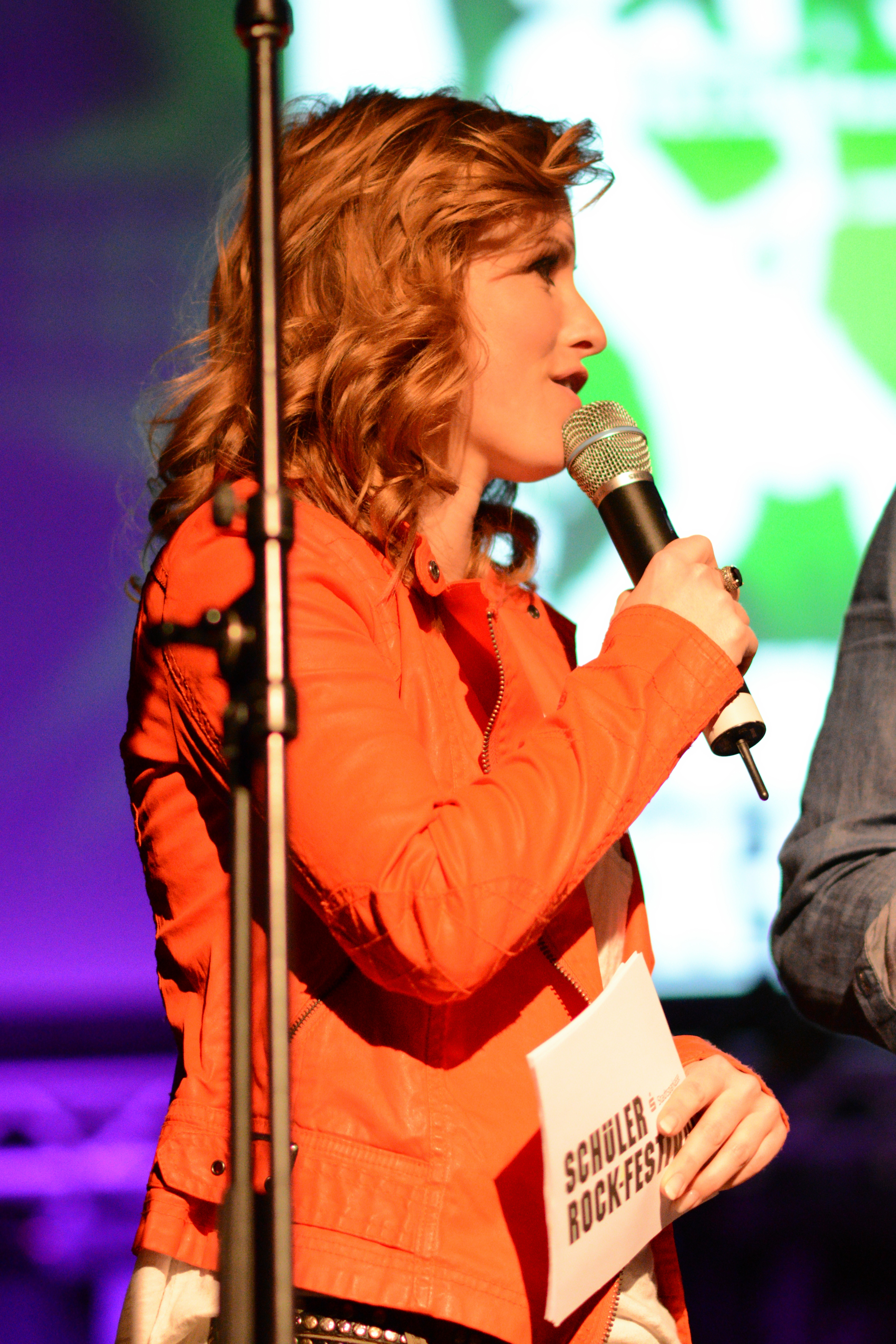 Sunny Bansemer bei der Moderation des Schüler-Rockfestival 2014.